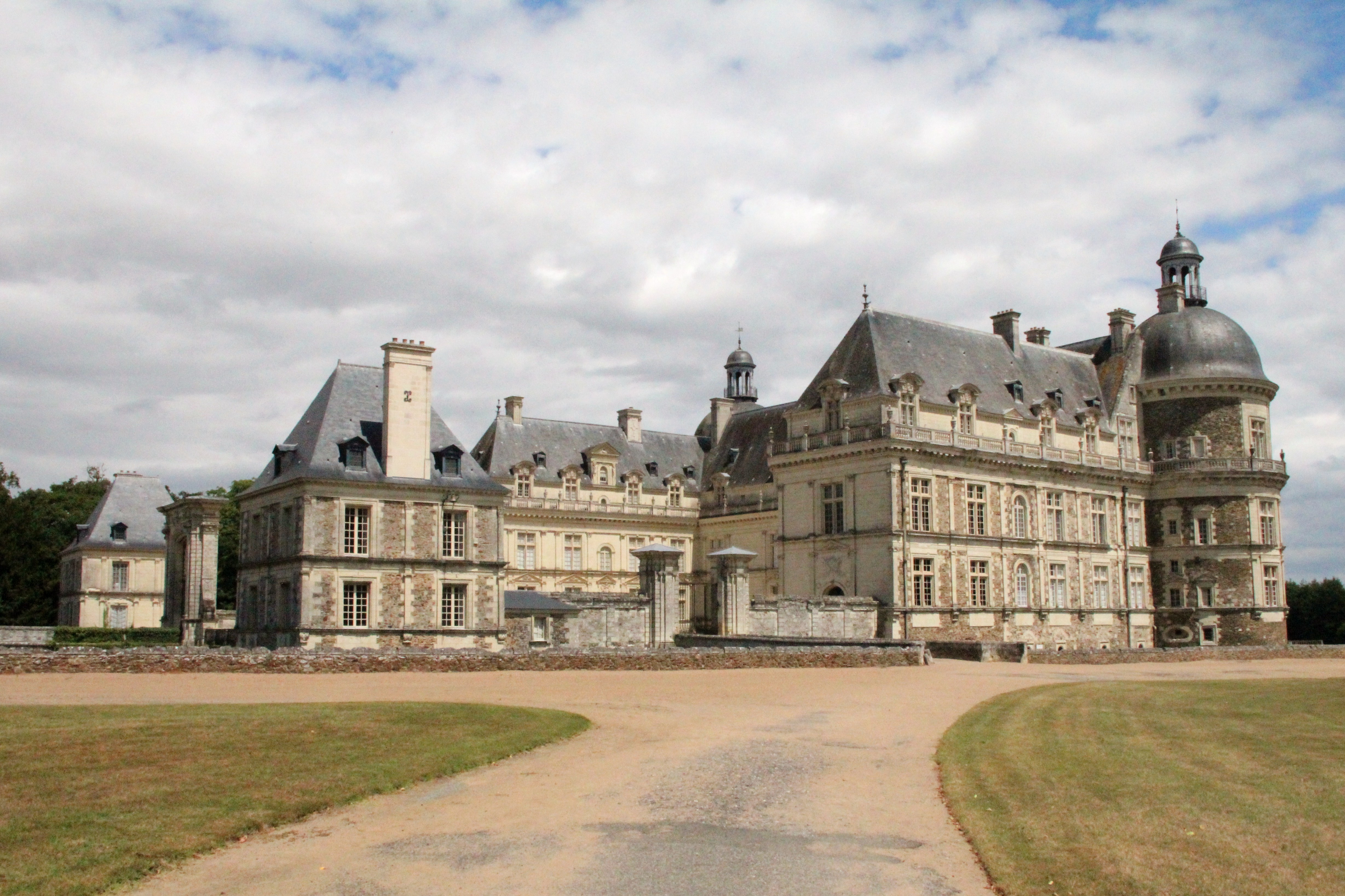 Entrée du château .